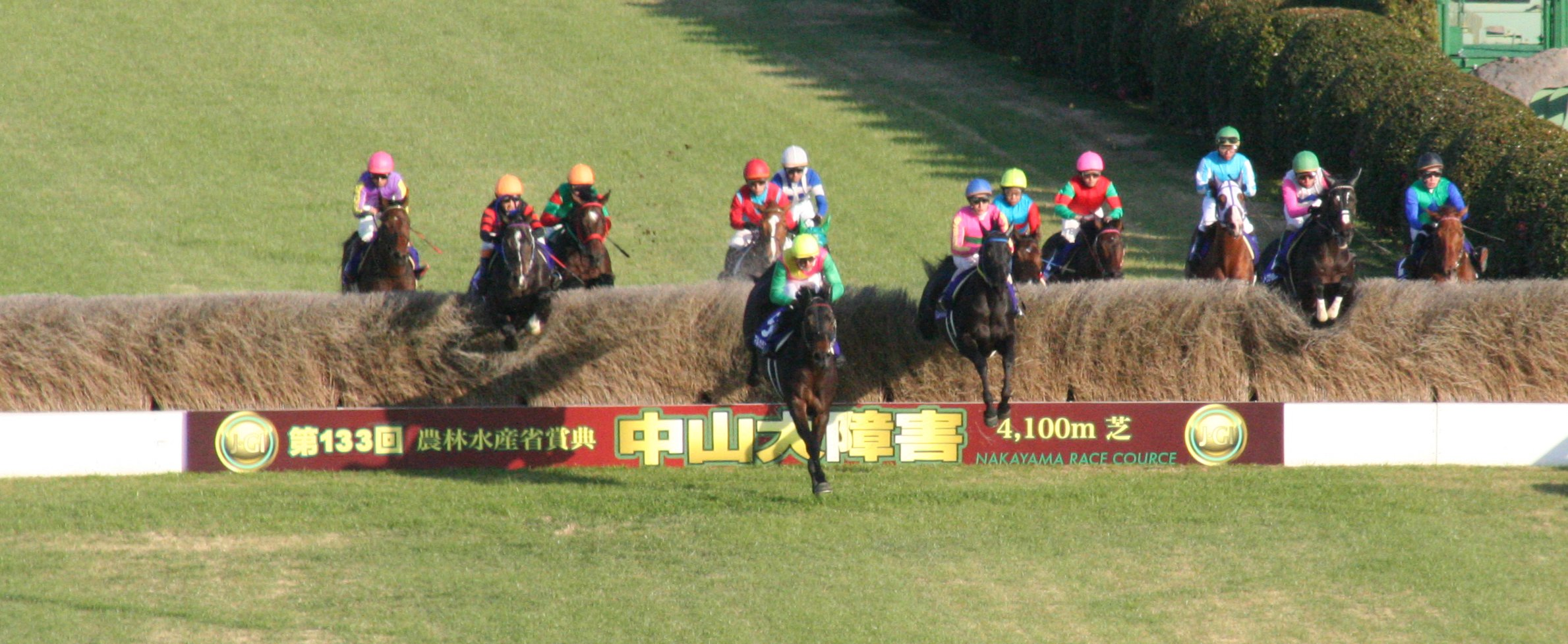 第133回中山大障害